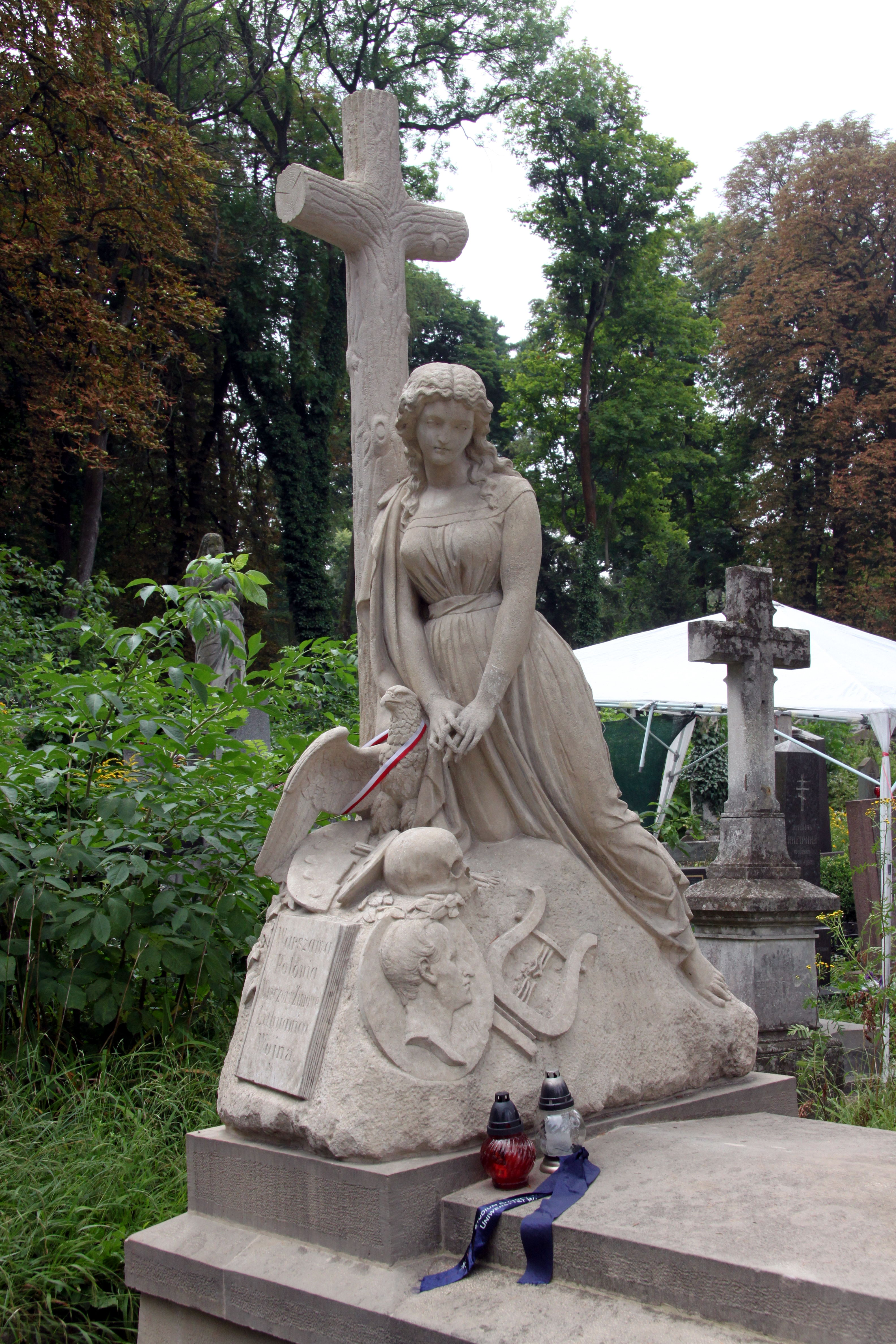 Гробниця Гроттгера А., польського художника, вул. Мечнікова, Личаківське кладовище, поле 5, Львів